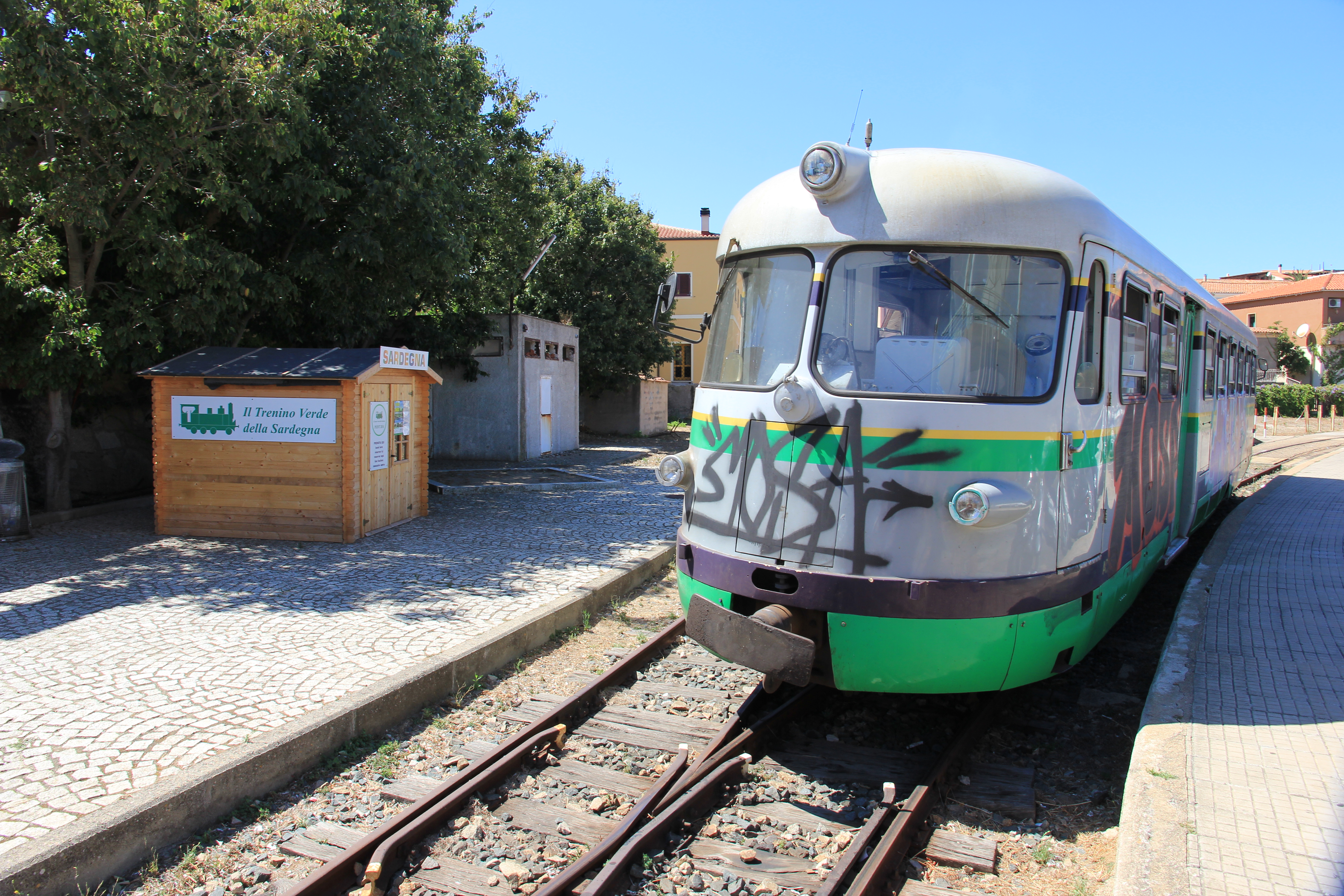 Palau, stazione ferroviaria di Palau Marina